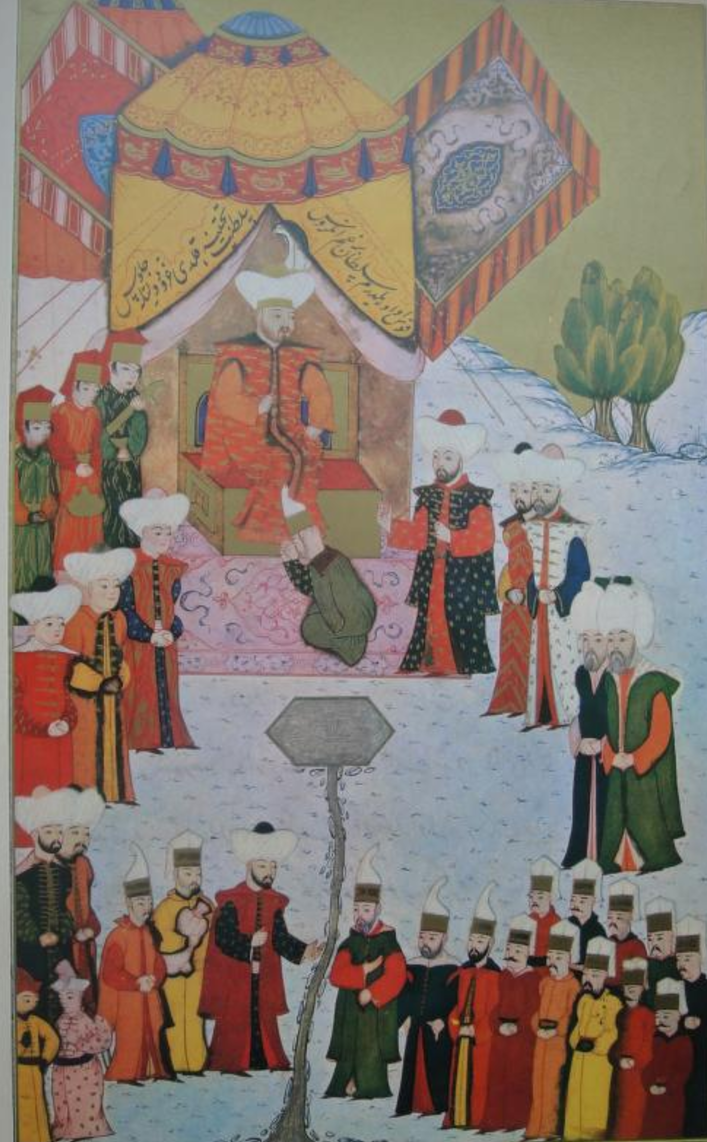 Джулюс Баязида I в Косово